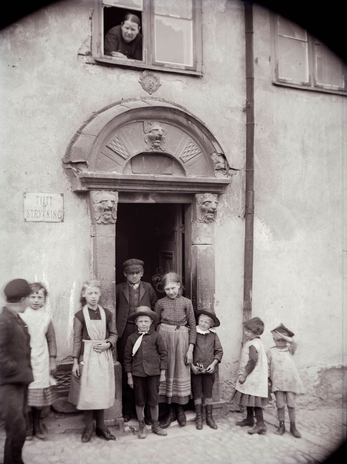 depicted place: Stockholm, Östermalm, Kvarngatan 31 (Sverige (SE))